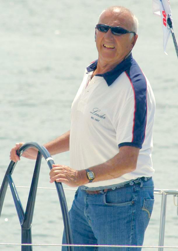 André Nelis tijdens de zeilwedstrijd Schelderegatta. 20 juni 2008